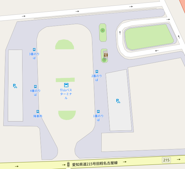 Openstreetmapによる引山バスターミナルの地図 This map may be incomplete, and may contain errors. Don't rely solely on it for navigation.